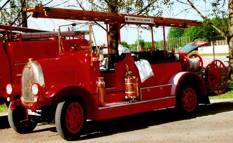 Tidaholm Fire Engine 1924Räddningstjänsten Linköping